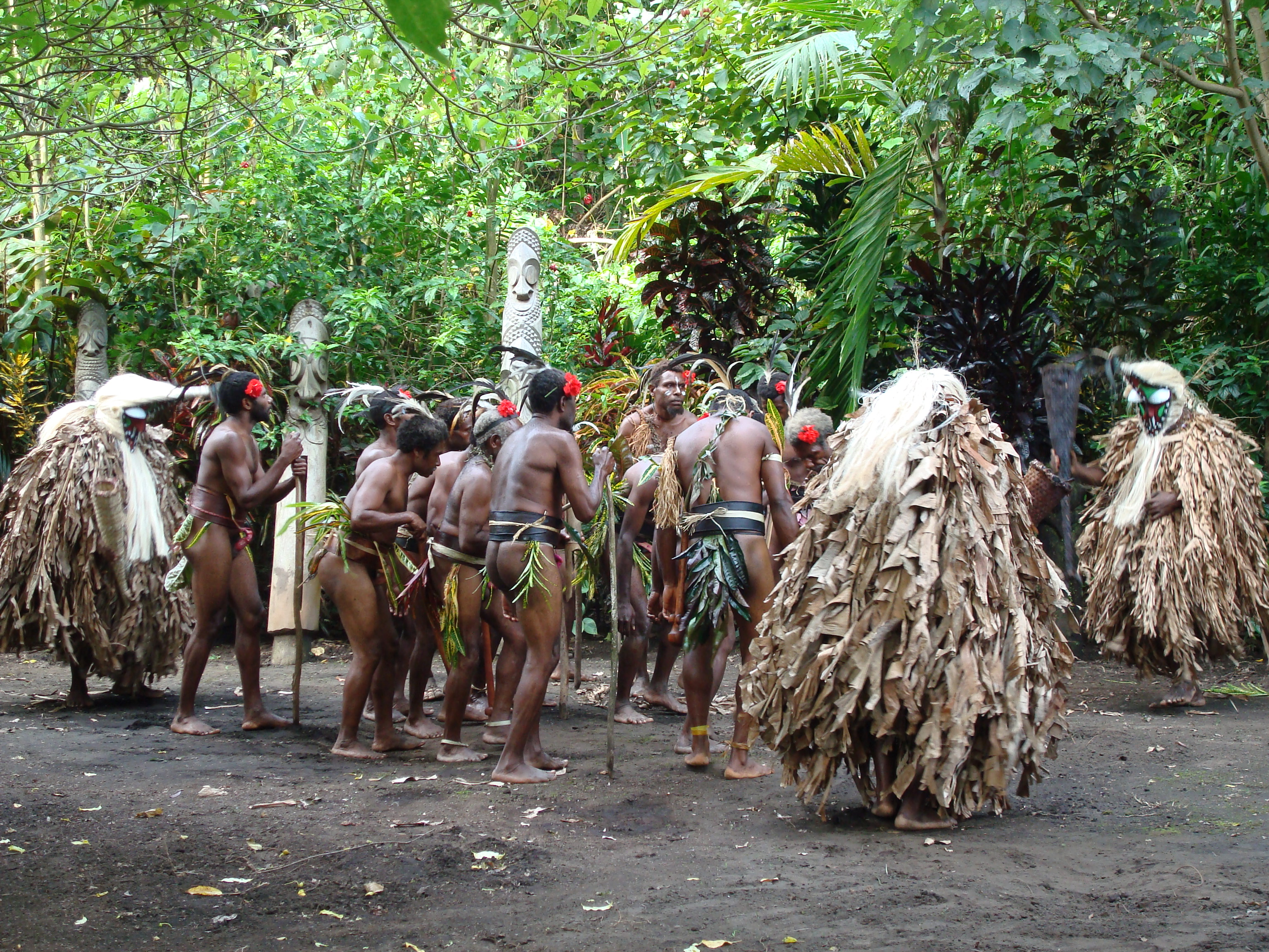 Dance du Rom dans le village de Polibetakeber